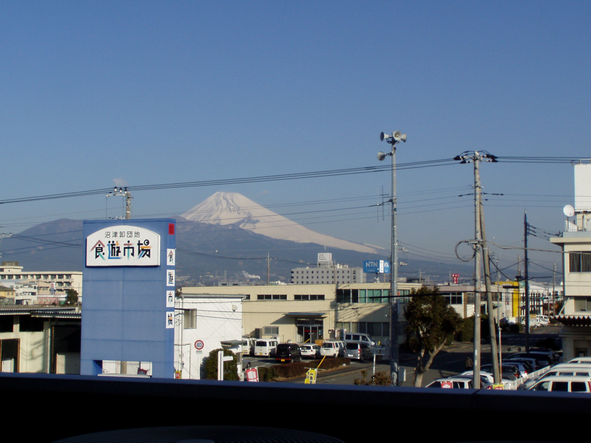 numazu orosidanchi/syokuyuuichiba（食遊市場） in Shizuoka japan